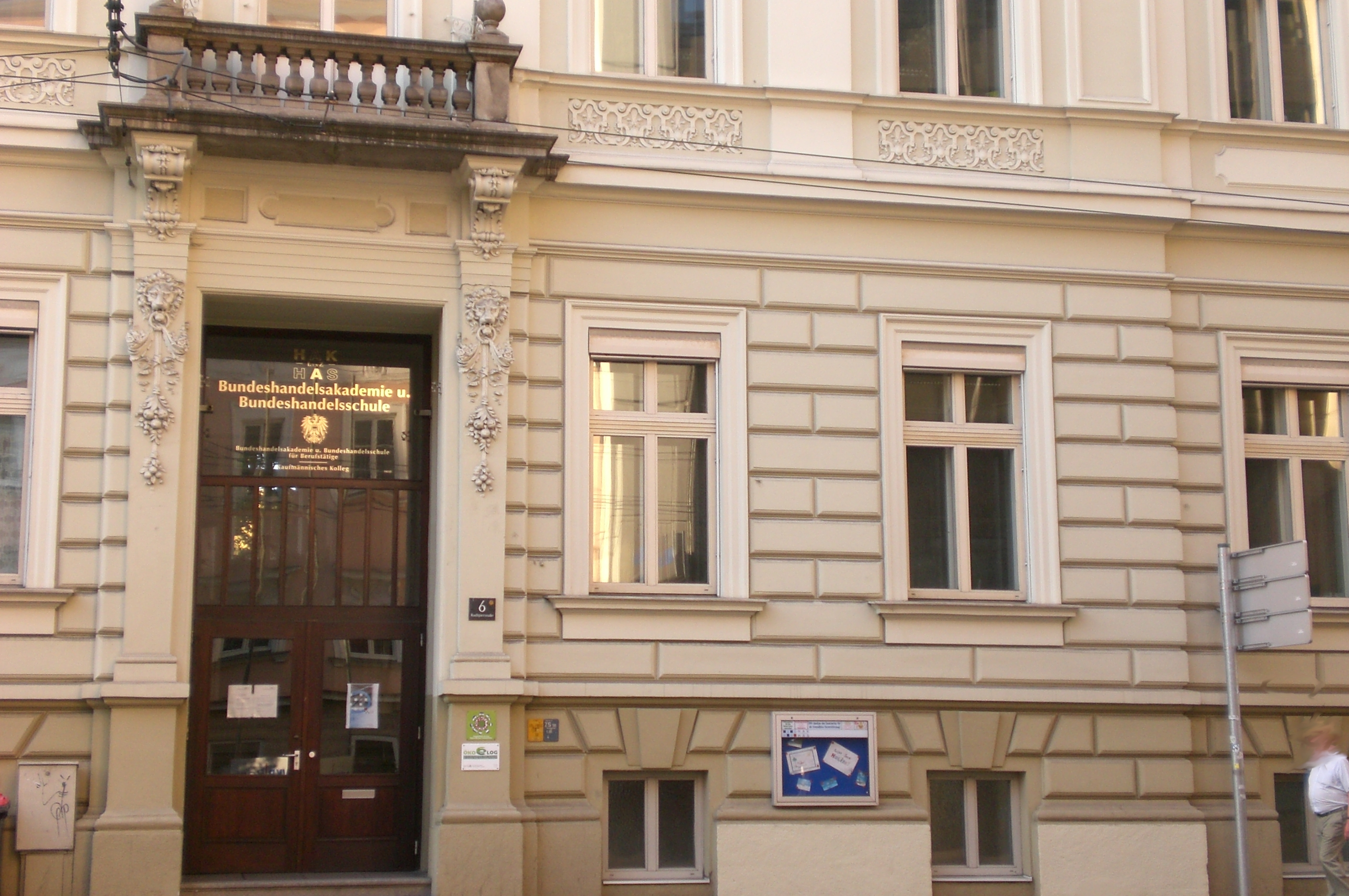 Eingang der Handelsakademie Rudigierstr. in Linz